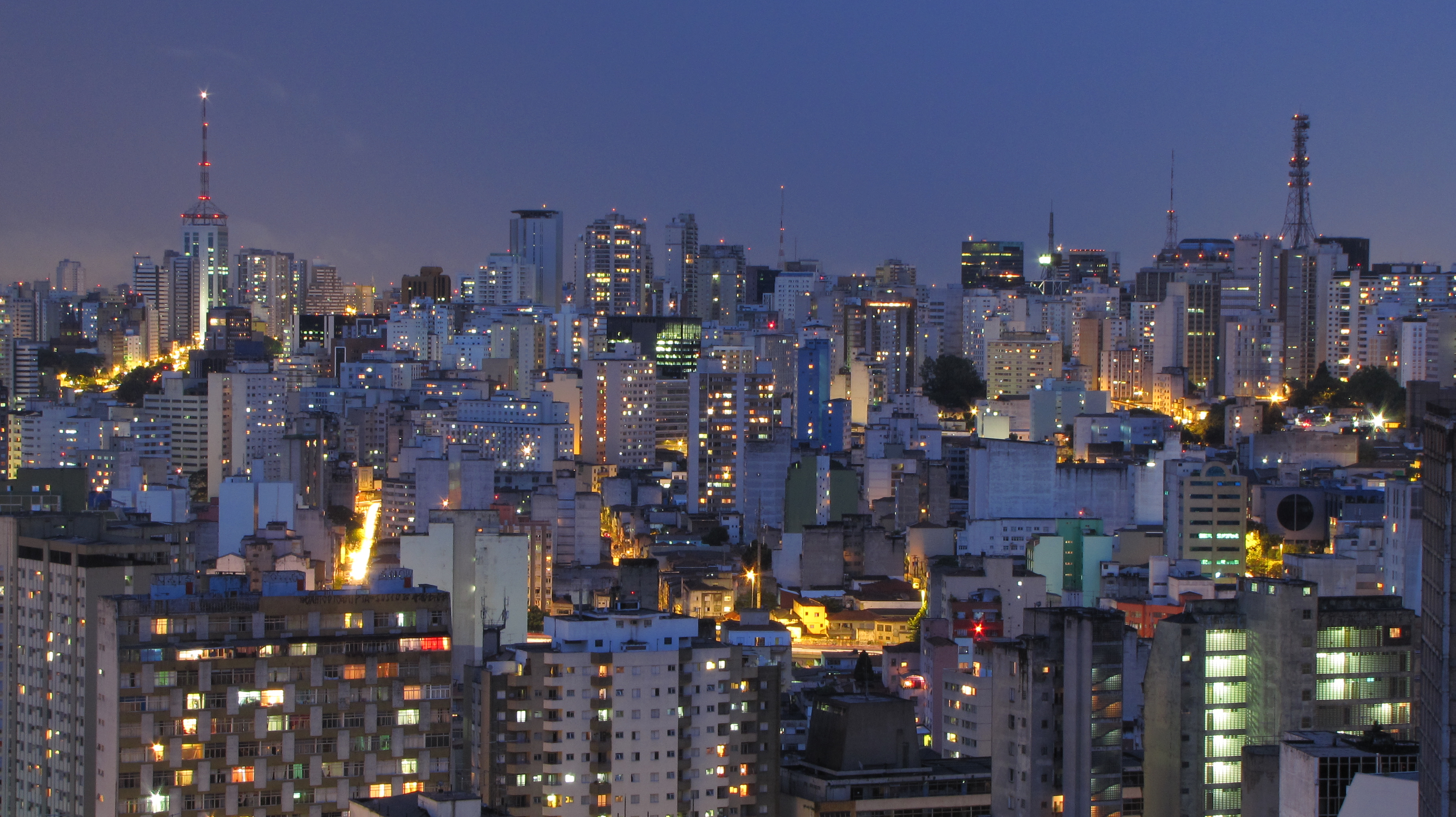 Panorama da cidade de São Paulo, Brasil.